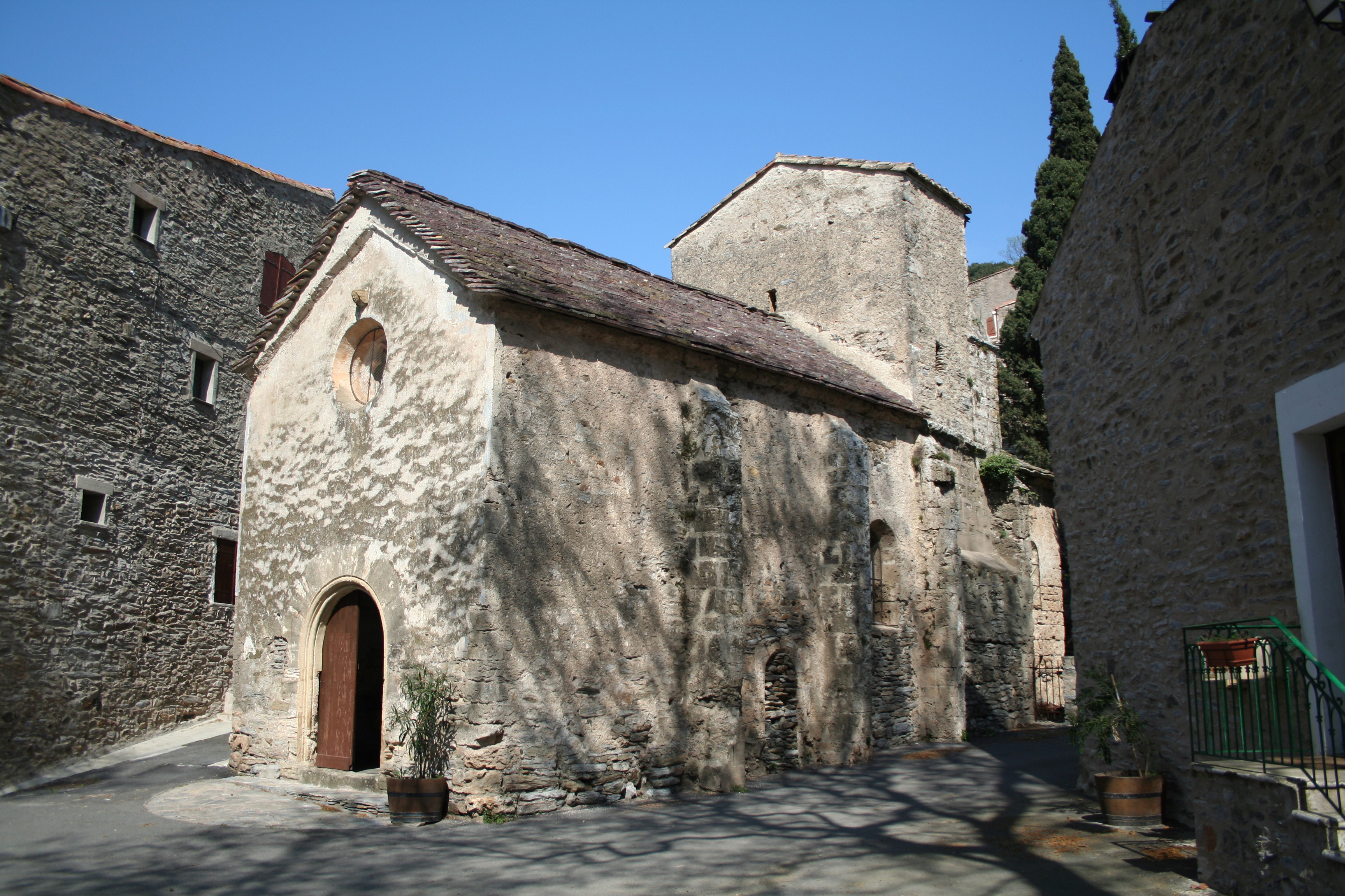 Cabrières (Hérault) - église romane Saint-Martin des Crozes (XIe siècle).